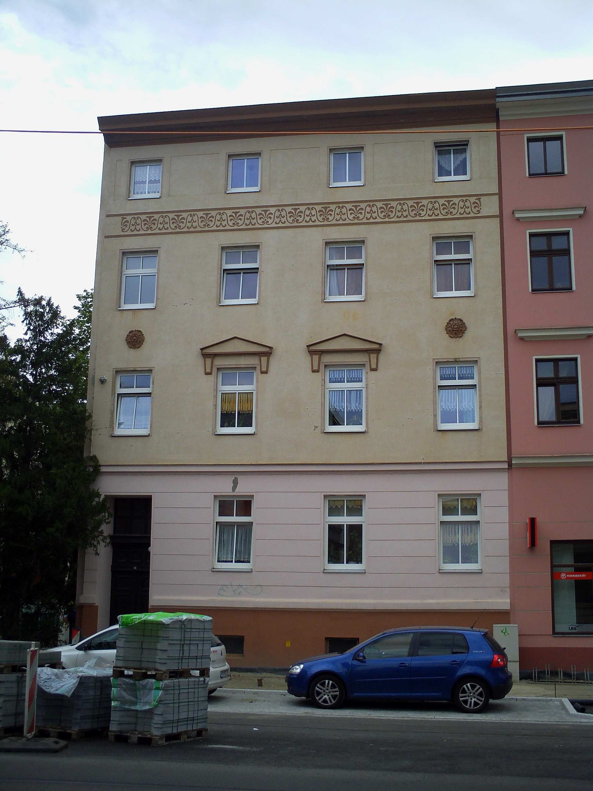 Bahnhofstraße 16 in Cottbus